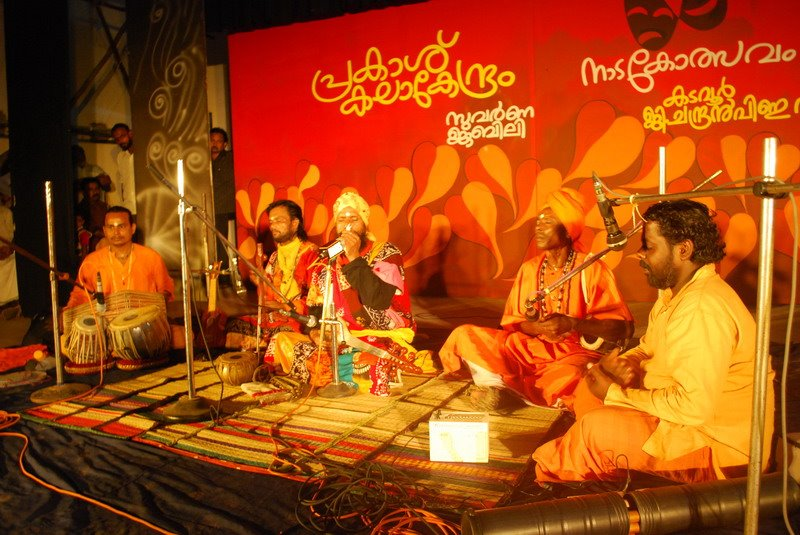 Tharundas baul, baul singer performing at Kollam